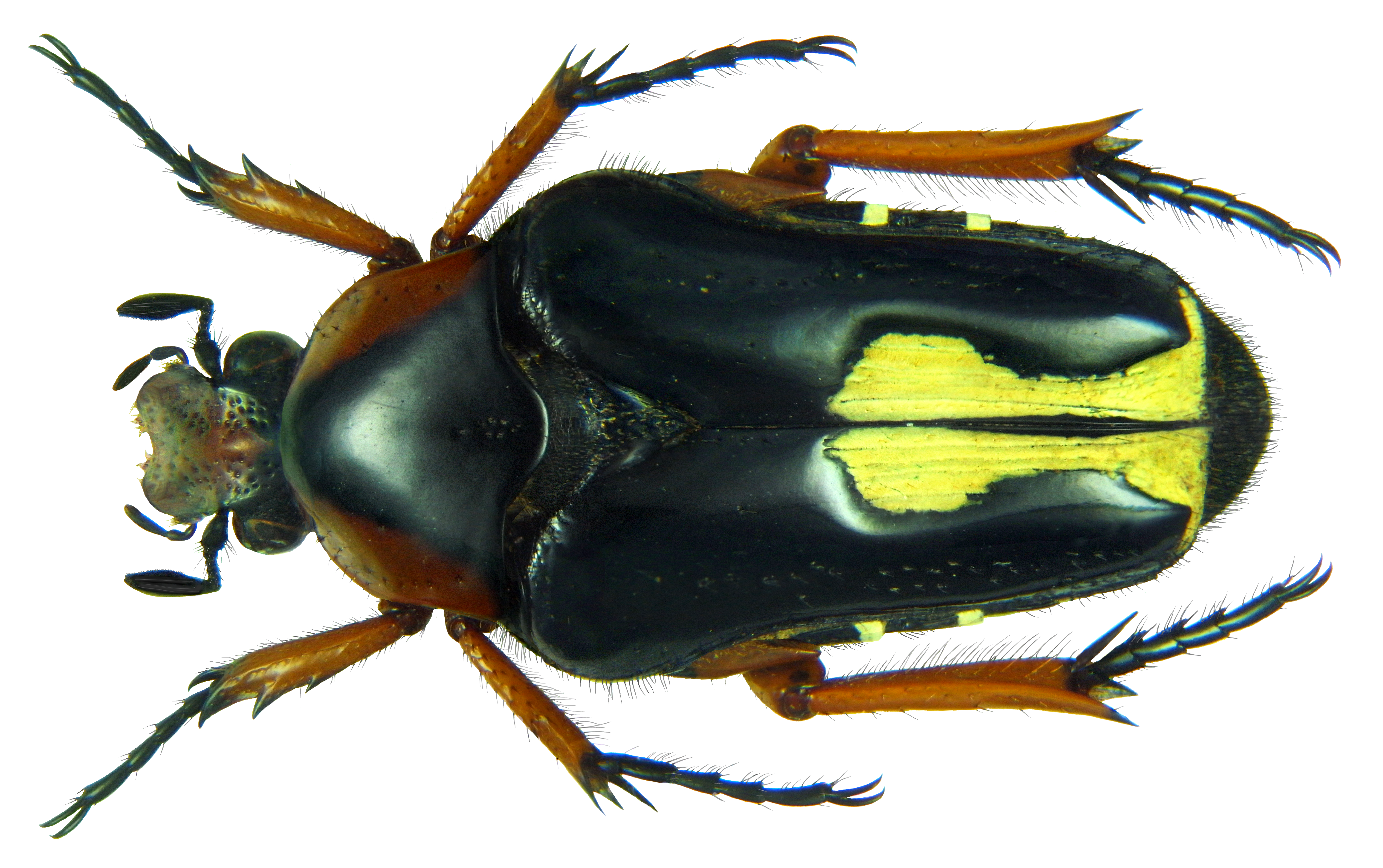 Familie: Scarabaeidae Groesse: 19,2 mm (17-19,6 mm) Verbreitung: Sulawesi Fundort: Indonesien, Sulawesi, Palu leg. loc. collectors, 4.IX.2002; det. U.Schmidt, 2013 Photo: U.Schmidt, 2013